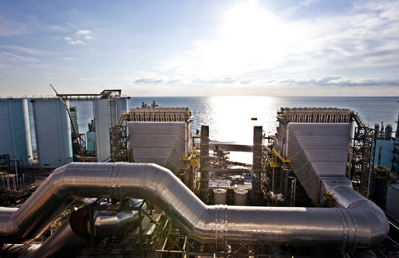 Torrevaldaliga Nord, carbone pulito, Civitavecchia, impianto termoelettrico ad alta efficienza